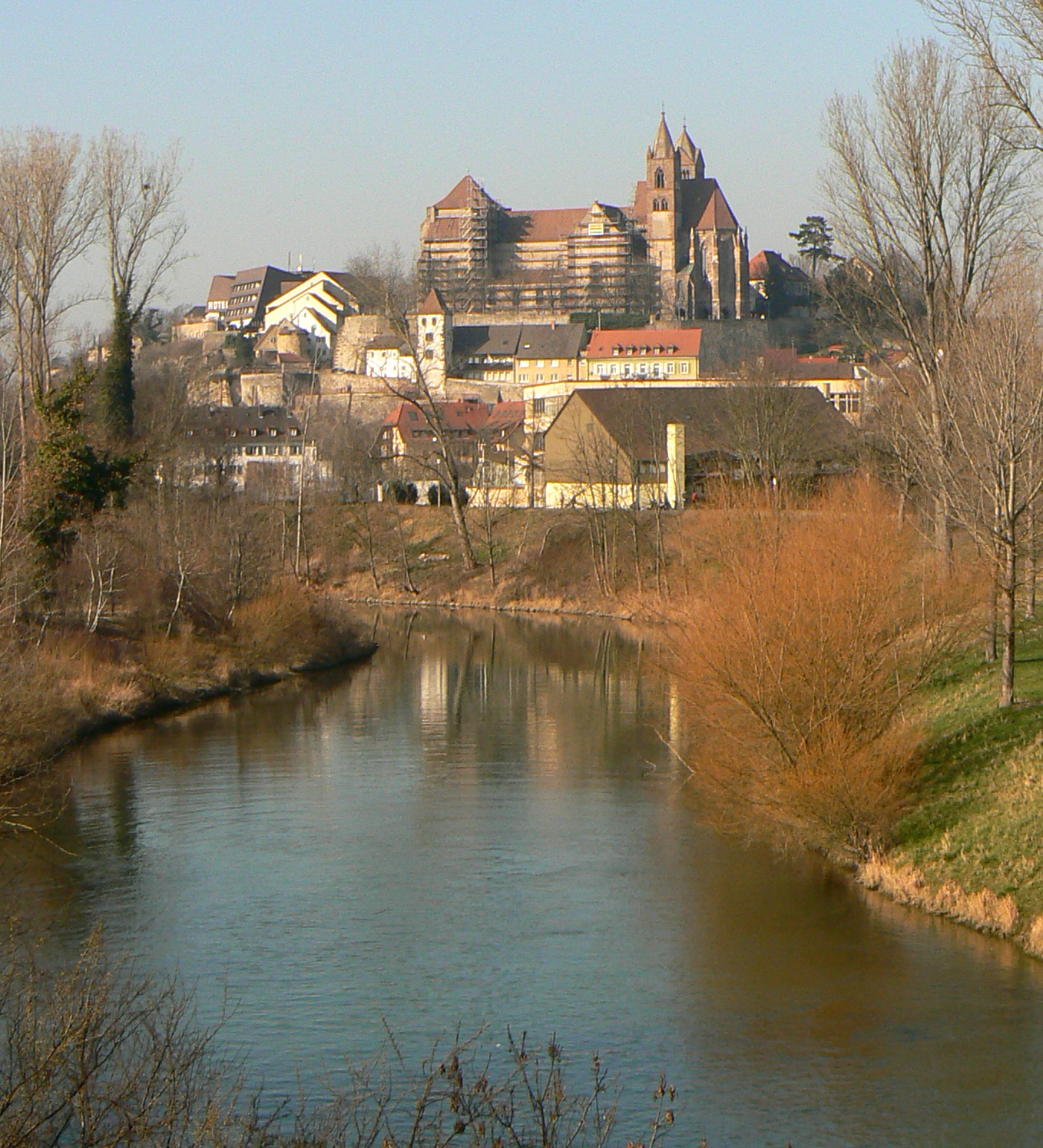 Blick über die Möhlin zum Breisacher Münster